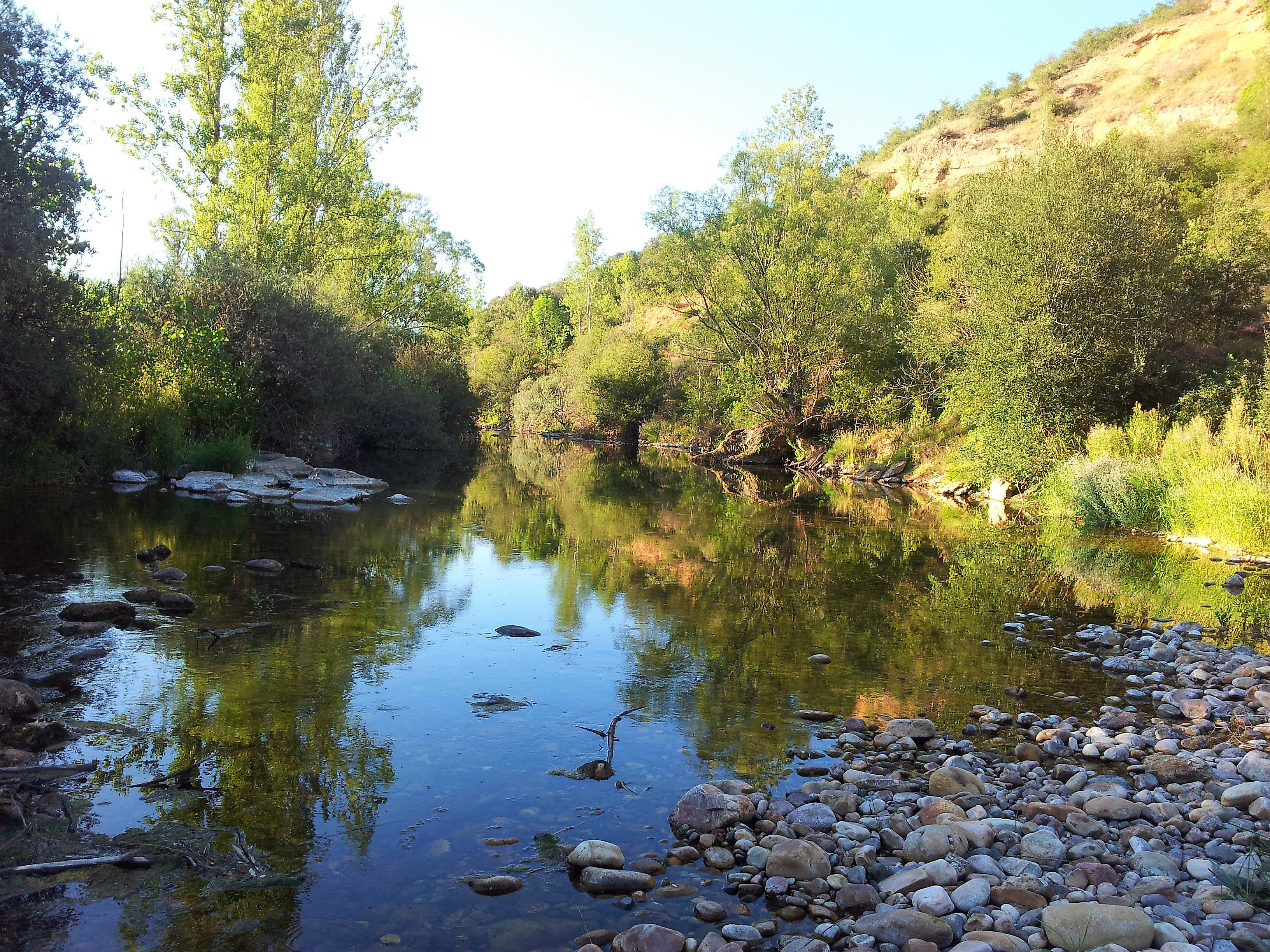 Vista del pozo del río Curueño en Gallegos